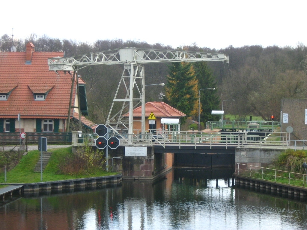 Der Bützrhin mit Klappbrücke an der Alten Dorfstraße in Altfriesack (Wustrau-Altfriesack, Landkreis Ostprignitz-Ruppin, Brandenburg). Der Bützrhin ist ein Teil des Systems des Rhins und gehört zur Ruppiner Wasserstraße.